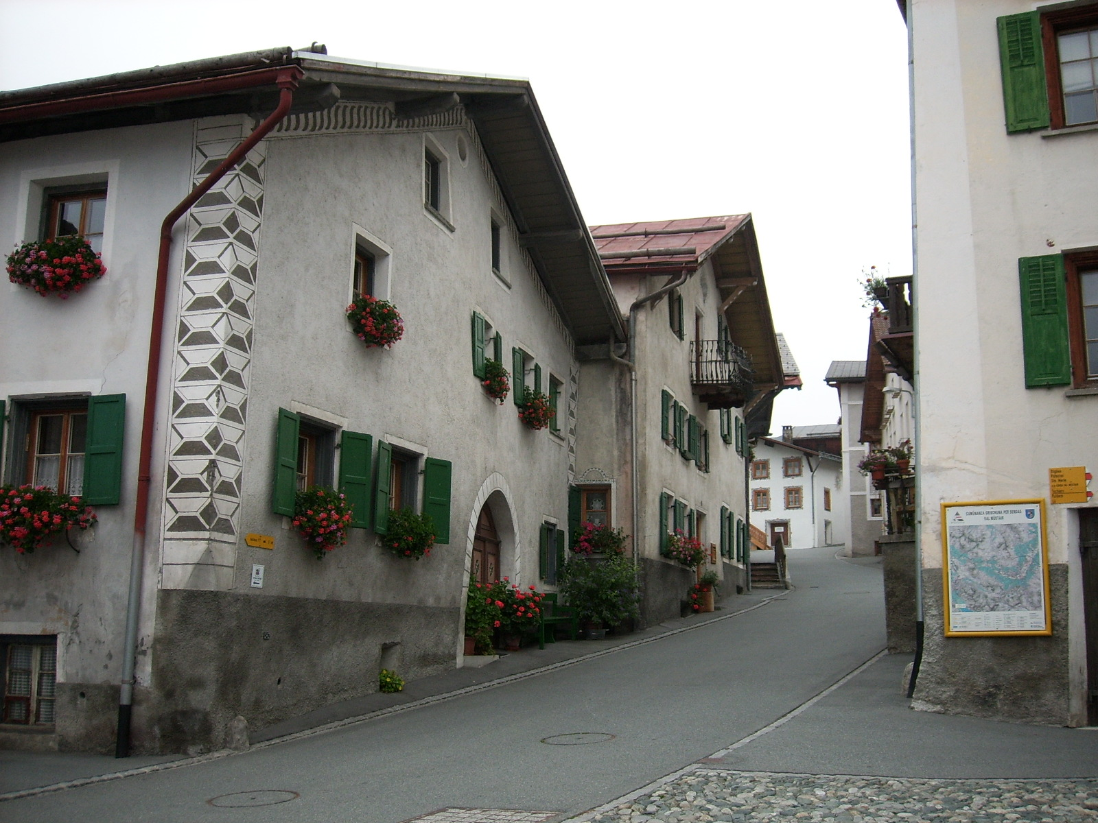 Street in Valchava, Switzerland